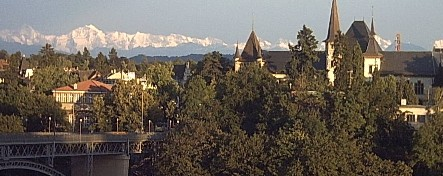 Aussicht von der Terrasse des 5*-Hotel Bellevue. Im Vordergrund das Historische Museum und die KirchenfeldbrÃ¼cke, im Hintergrund das Jungfrau Massiv im Berner Oberland. Eigenes Foto (von Benutzer:Fab3000)